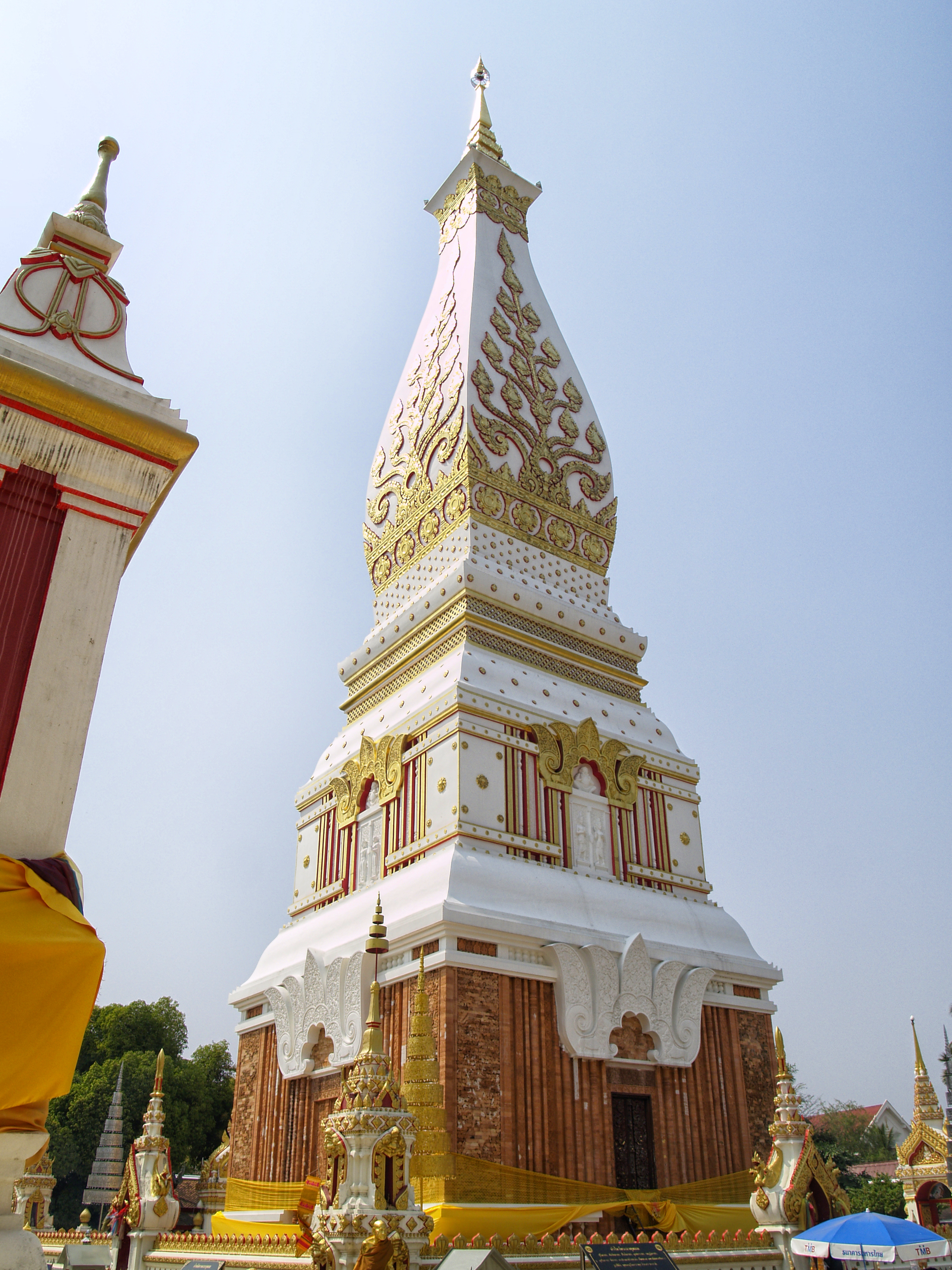 วัดพระธาตุพนมวรมหาวิหาร(พระธาตุพนม)